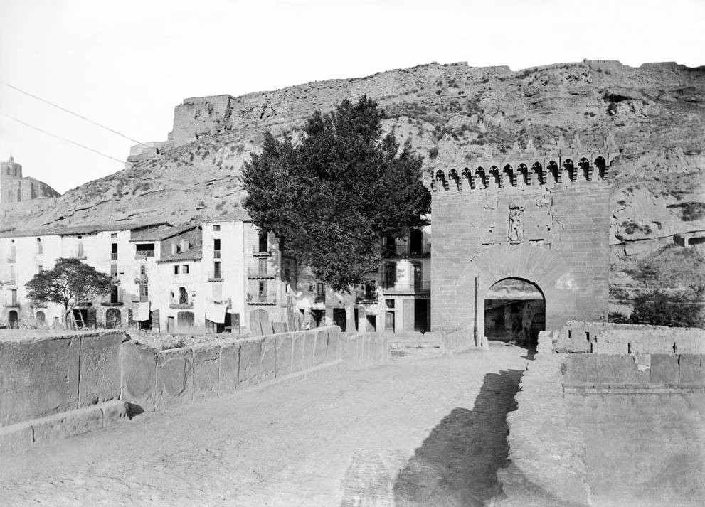 Imatge